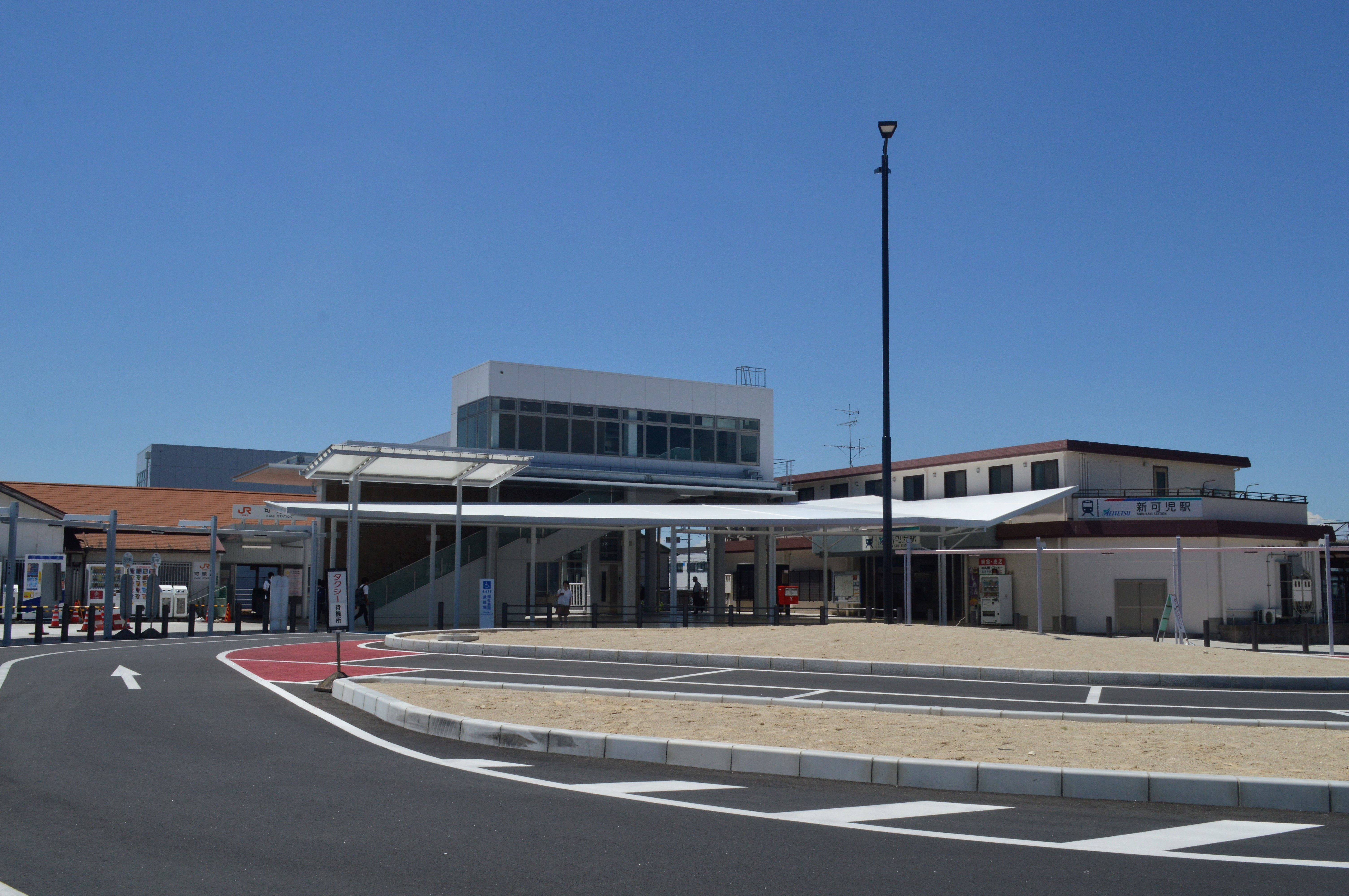 岐阜県可児市にあるJR高山本線可児駅（左）と名鉄広見線新可児駅（右）。共通の駅前ロータリー。